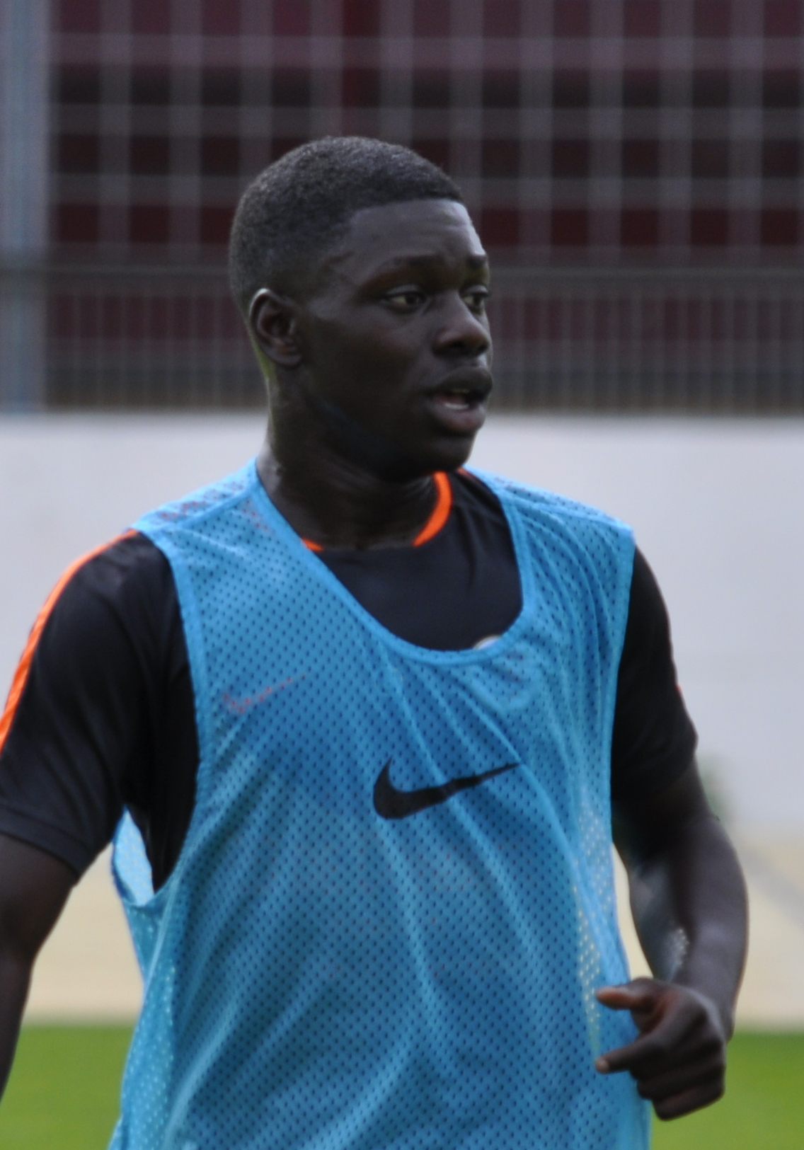 Jean-Victor Makengo lors de son premier entrainement avec le groupe professionnel du Stade Malherbe Caen